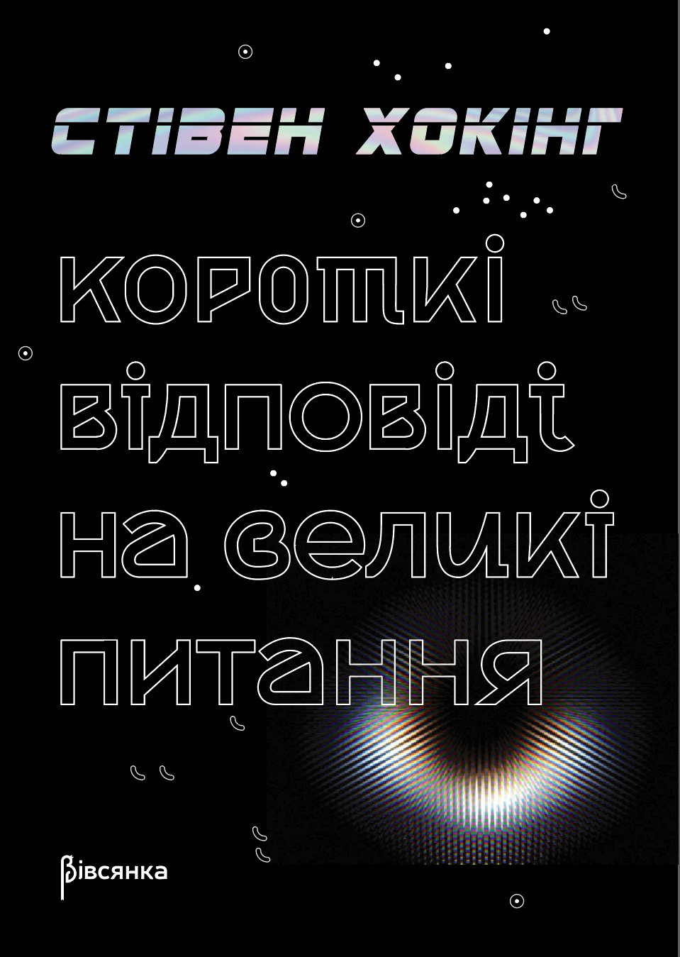 Обкладинка українського видання книжки Стівена Хокінга «Короткі відповіді на великі питання». Дизайнерка Катерина Яцушек